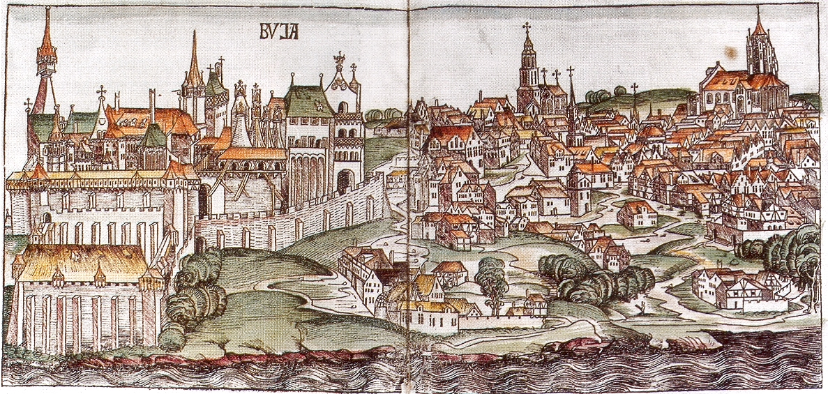 Buda